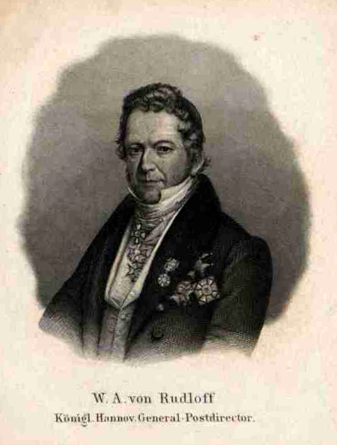 Ausschnitt aus einem digitalisierten Seitenausriss im Bildarchiv Austria der Österreichischen Nationalbibliothek mit einem Brustbild von Wilhelm August von Rudloff, Königlich Hannoverscher Generalpostdirektor. Aufgrund der geringen Auflösung des Digitalisates bzw. weiterer Angaben (etwa des Kontextes) konnte der Kupferstich noch nicht identifiziert werden ...